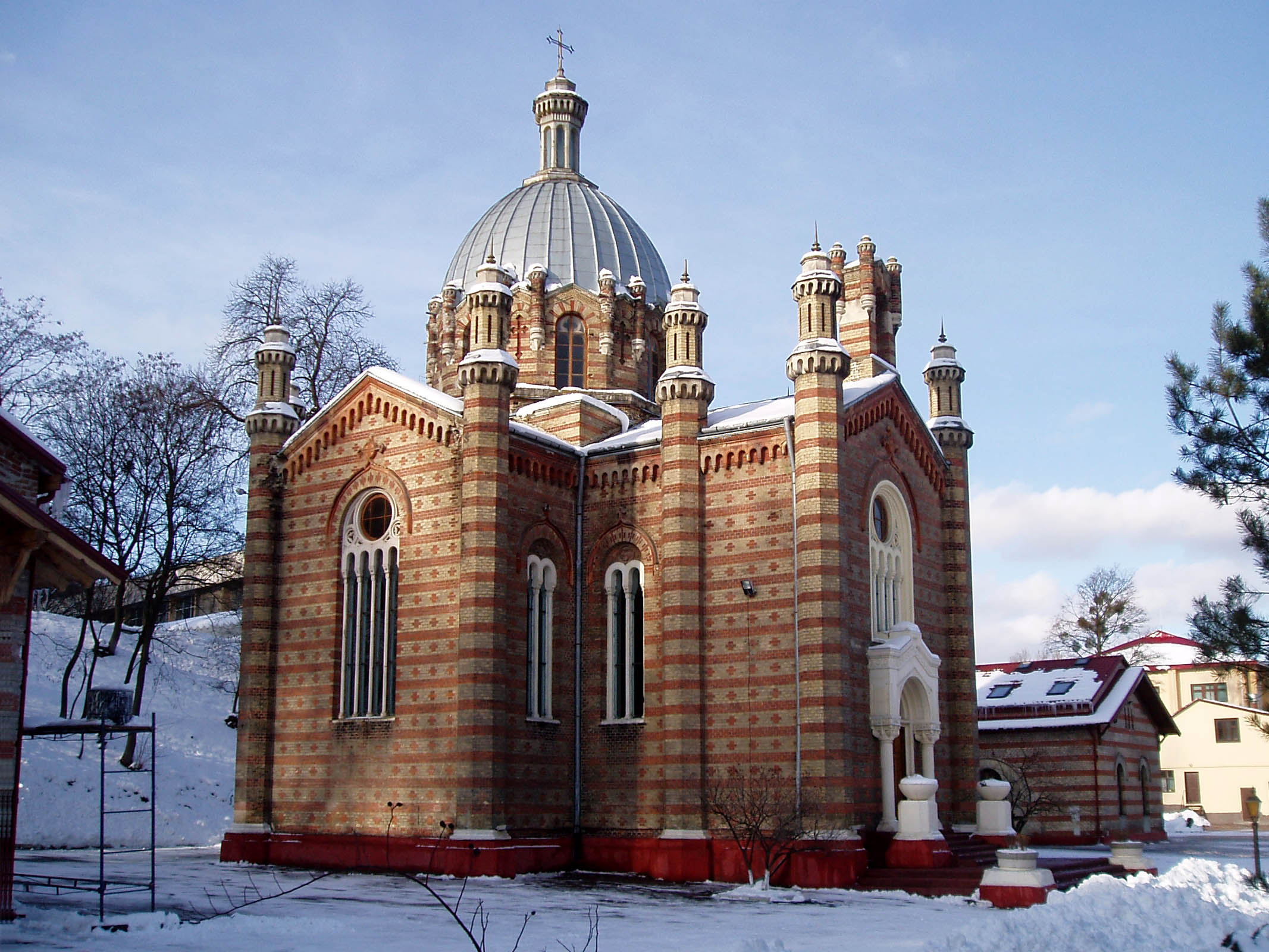 Церква Покрови Пресвятої Богородиці в подвір'ї Львівського державного університету безпеки життєдіяльності.